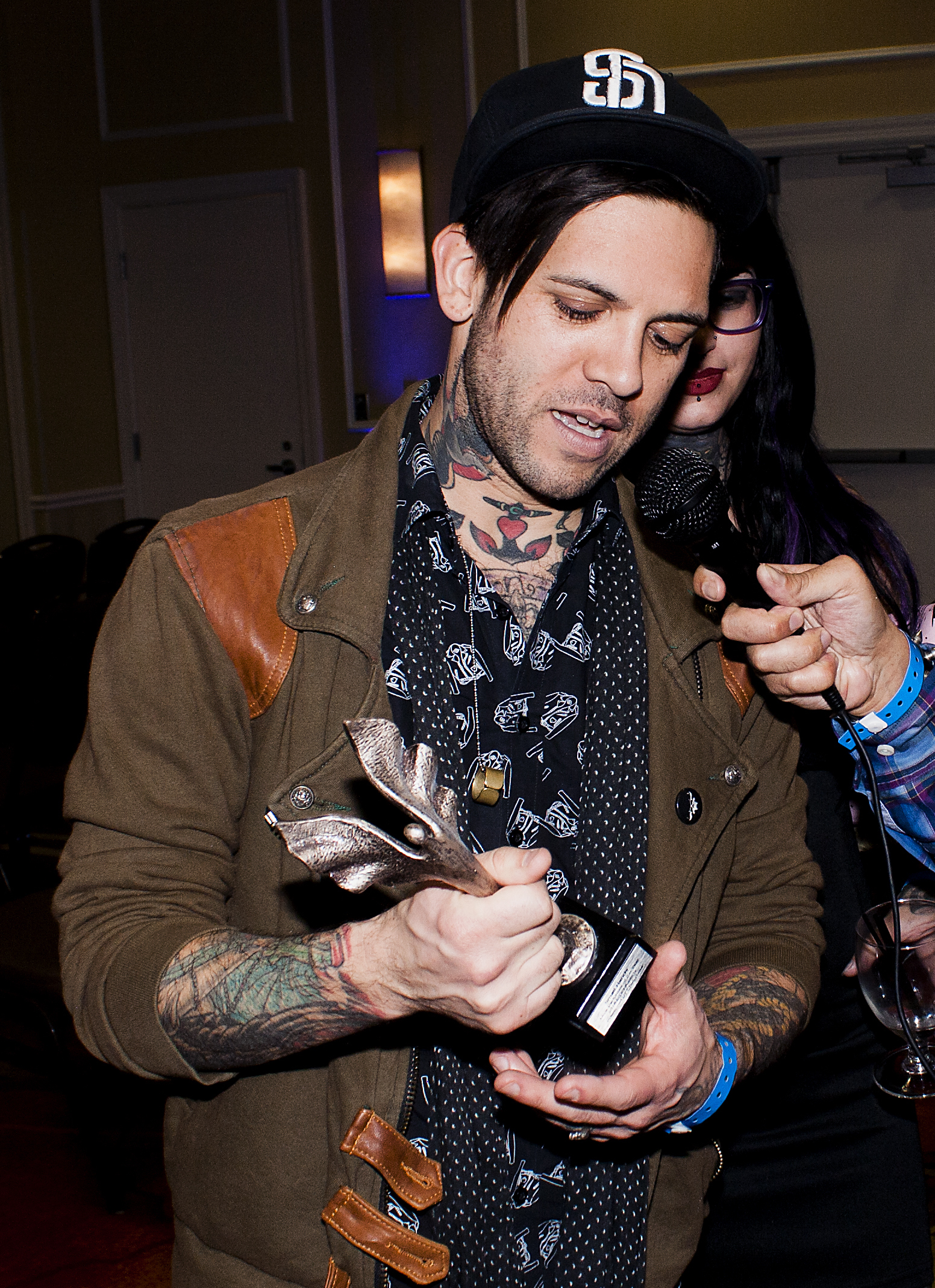 Exxxotica2016_0258bas